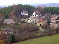 Pohled na Sýkořici – Seneckou.